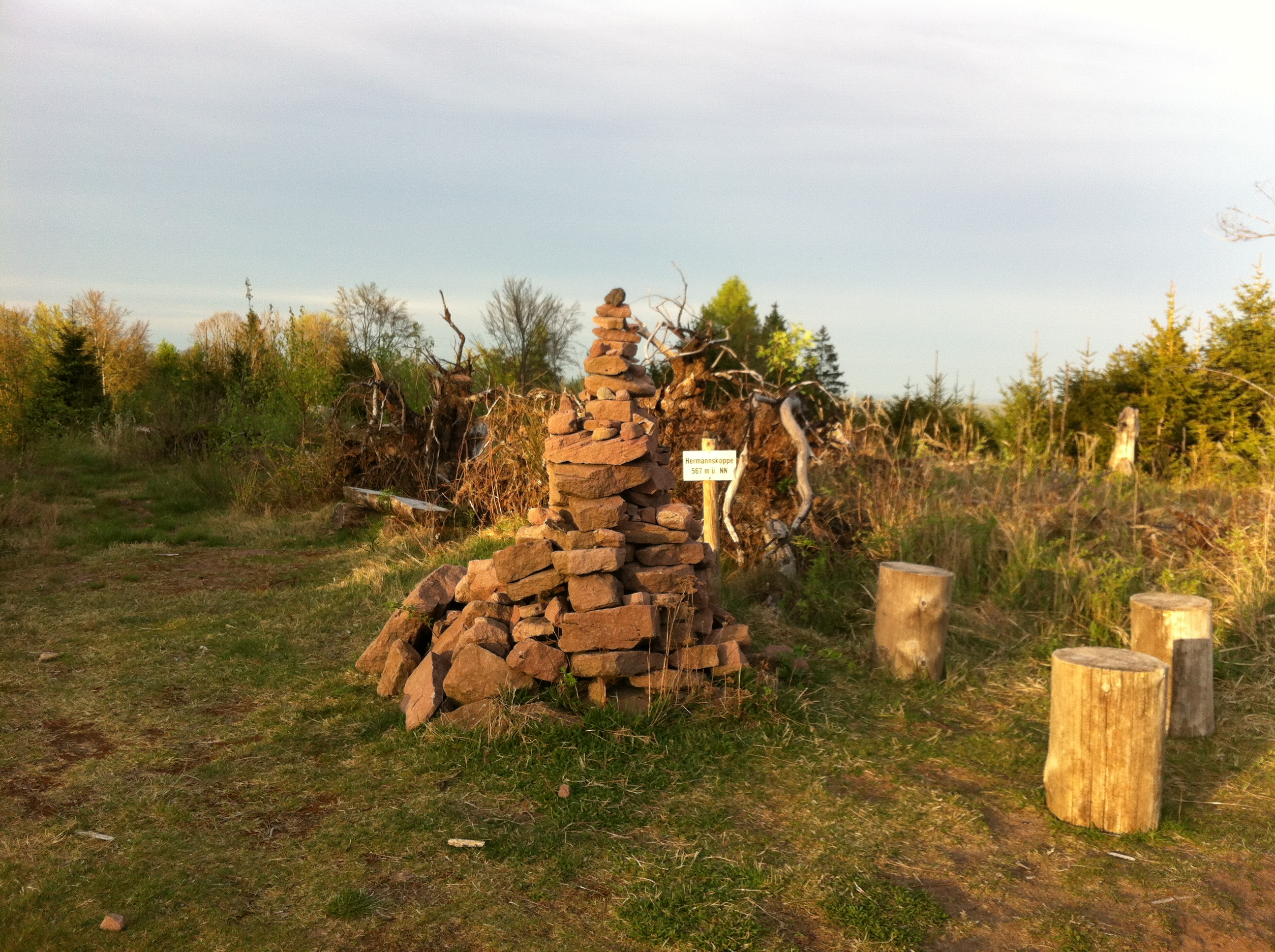 Hermannskoppe im hessischen Spessart